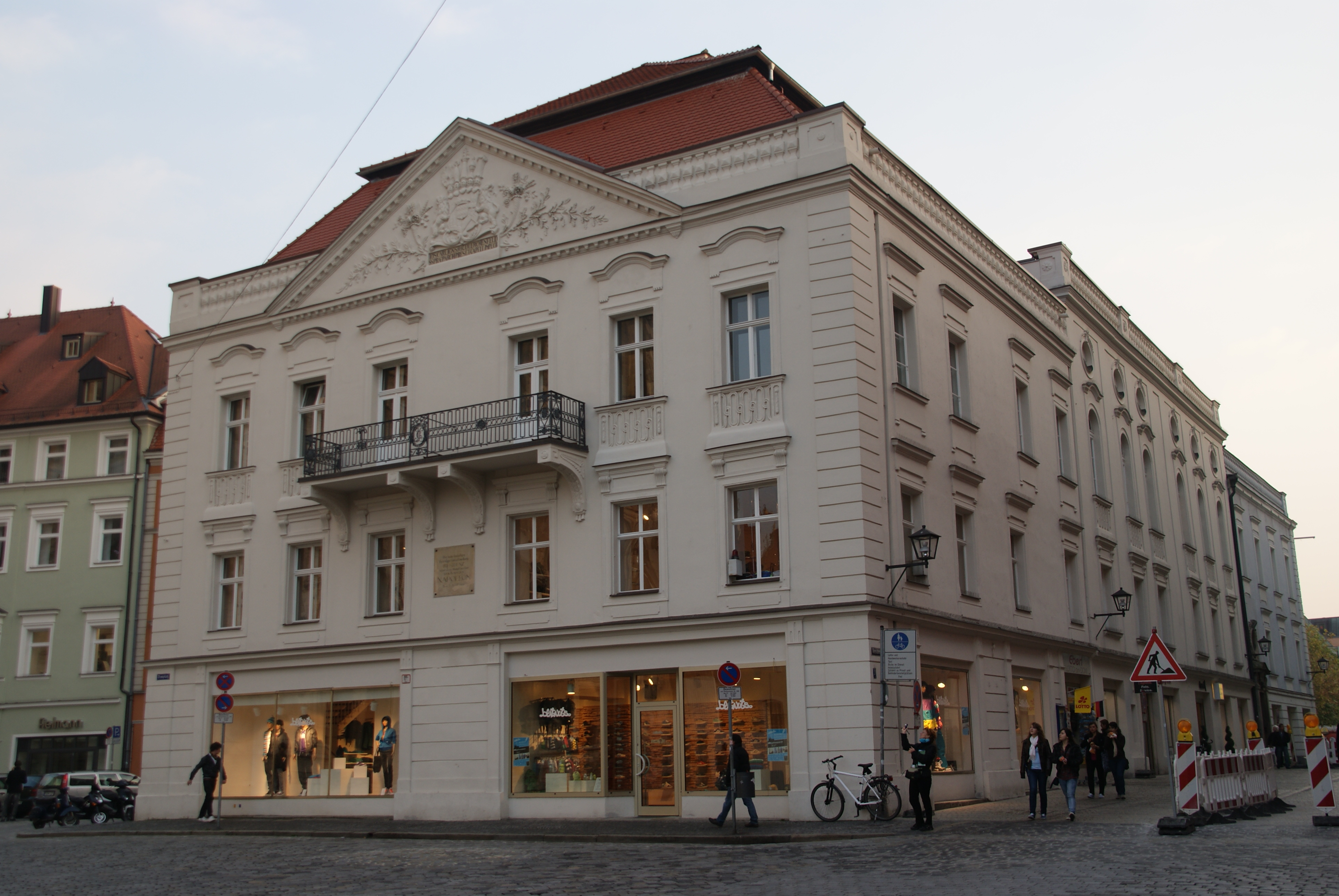 Ehemalige Dompropstei Regensburg. Im Auftrag des Dompropsts Josef Carl Ignaz Graf von Lerchenfeld durch den fürstlichen Baudirektor Joseph Sorg aus mehreren Vorgängerbauten erstellt. 1802-1810 Residenz des Fürstprimas Carl von Dalberg. Hauptquartier Napoleons 1809.